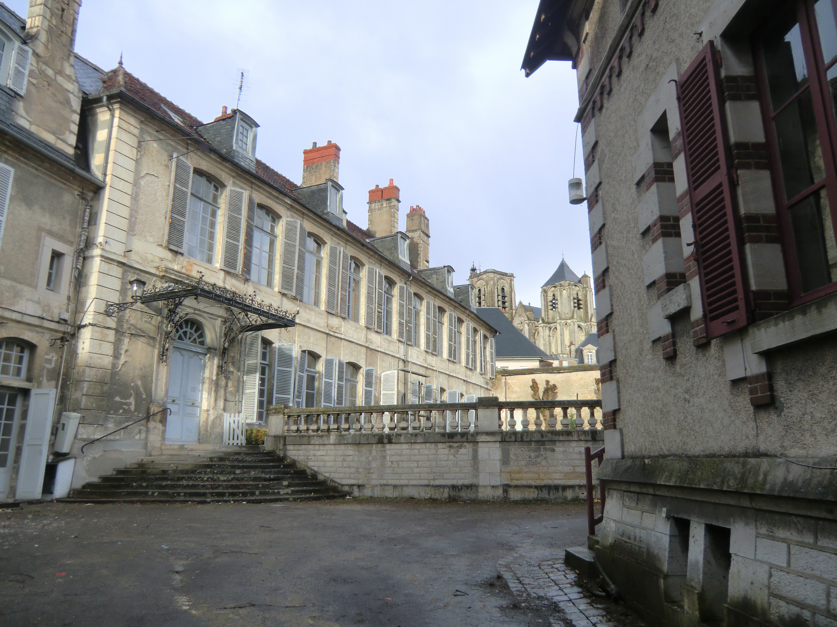 Hôtel de Panette en mars 2012, vue sur cathédrale